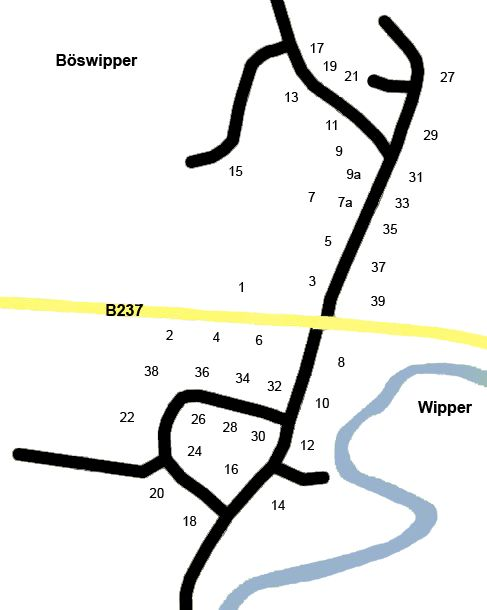 Zeigt die Hausnummern Böswippers